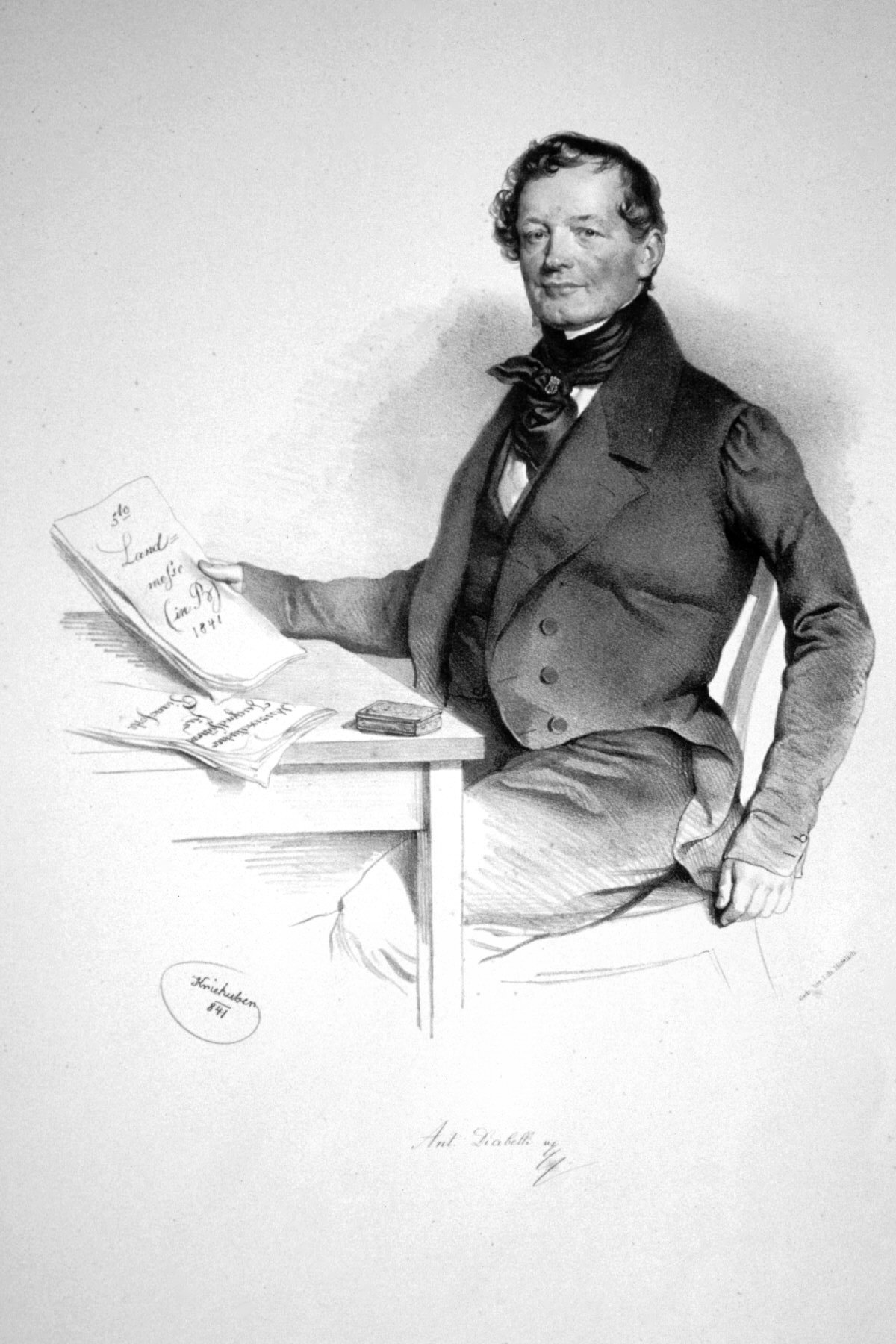 Anton Diabelli, Lithographie von Josef Kriehuber, 1841